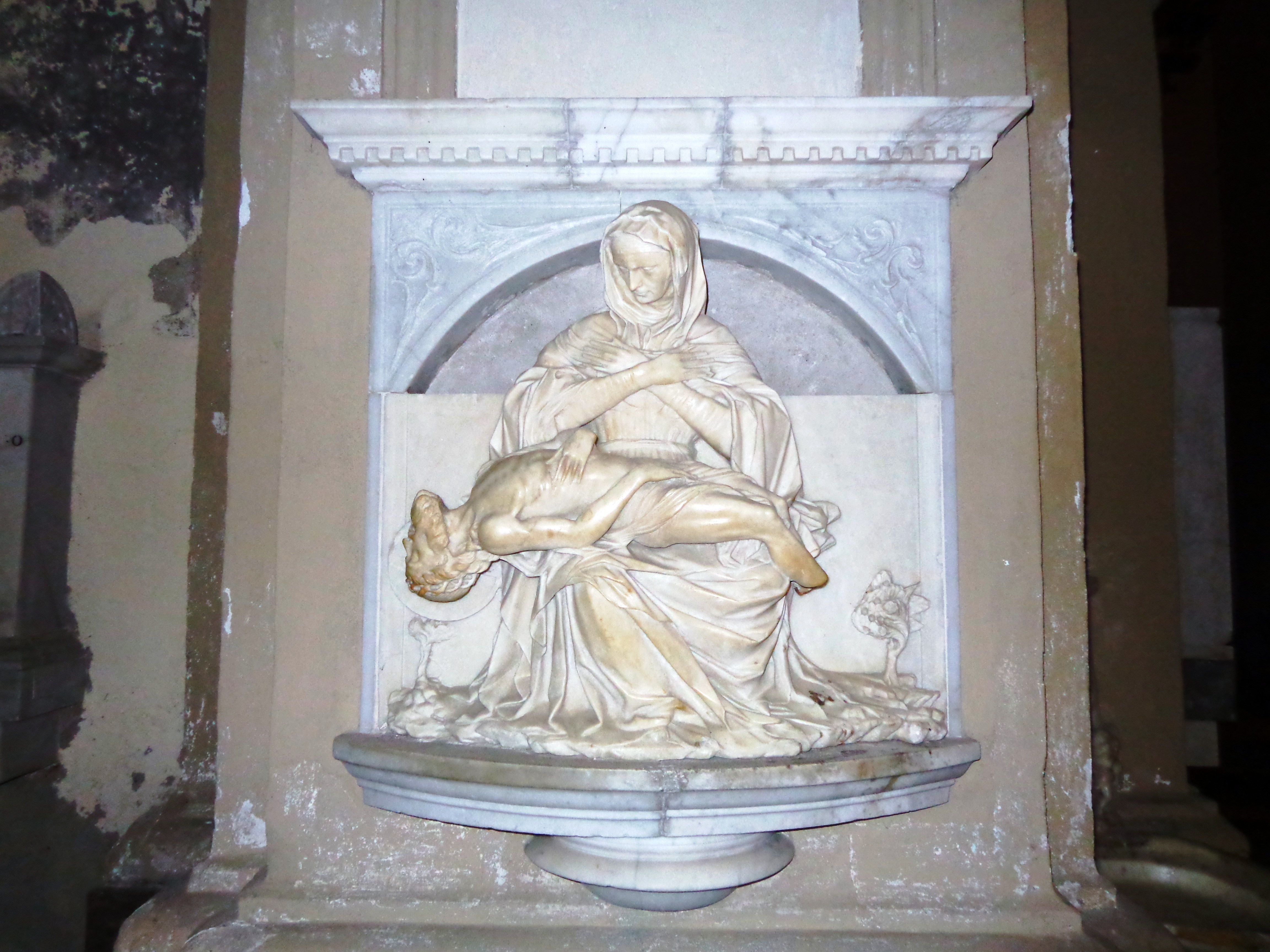 San Domenico PA 04